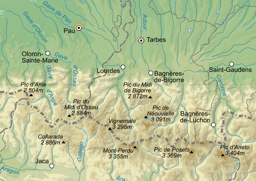 Carte topographique de l'ouest des Pyrénées centrales.